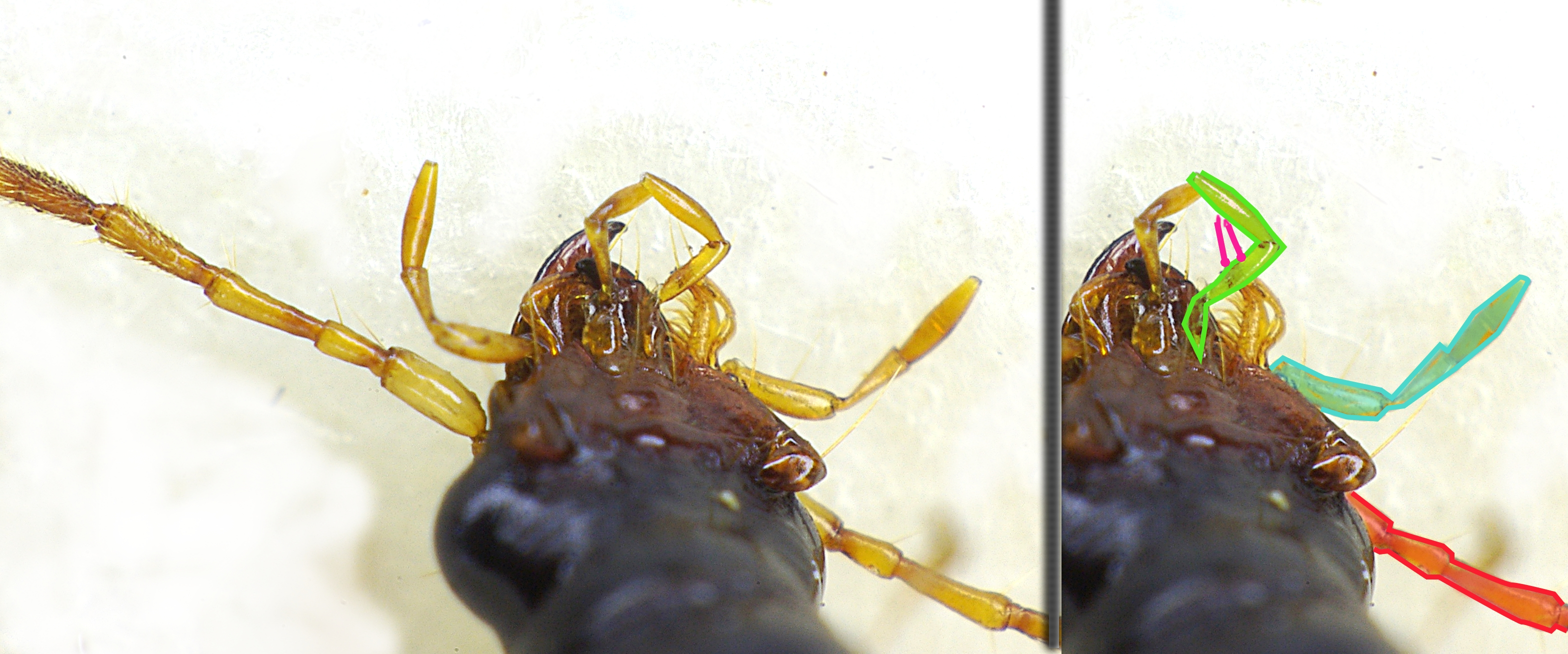 Head from Paranchus albipes from underside. Right side partly coloured grün:Lippentaster und pink: Borstenpaar auf dem vorletzten Glied des Lippentasters blau:Kiefertaster rot: Fühler